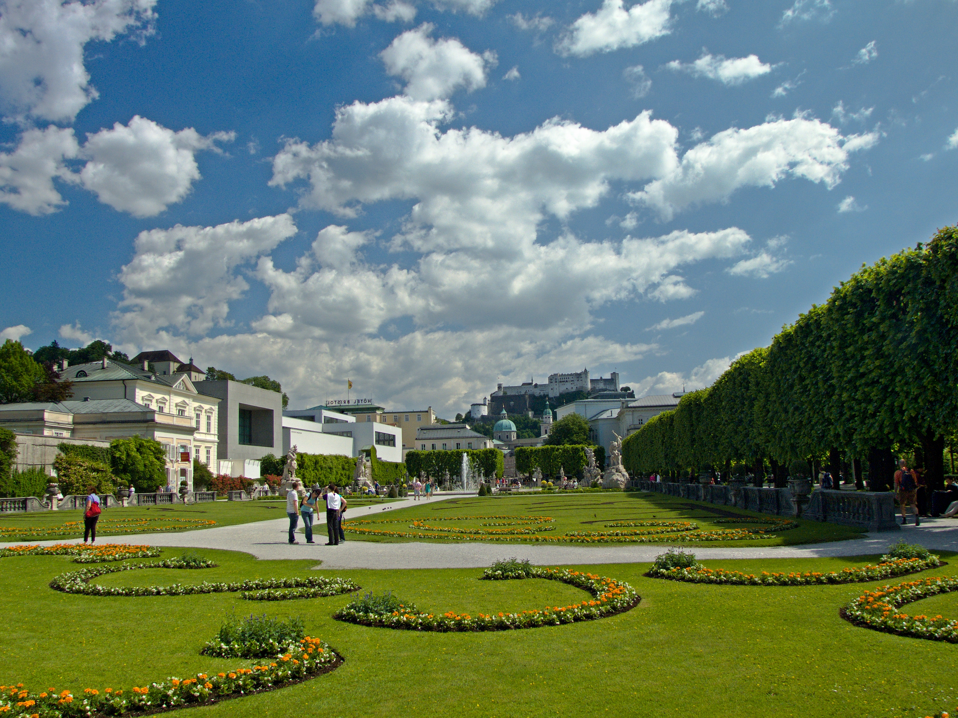 Hohensalzburg